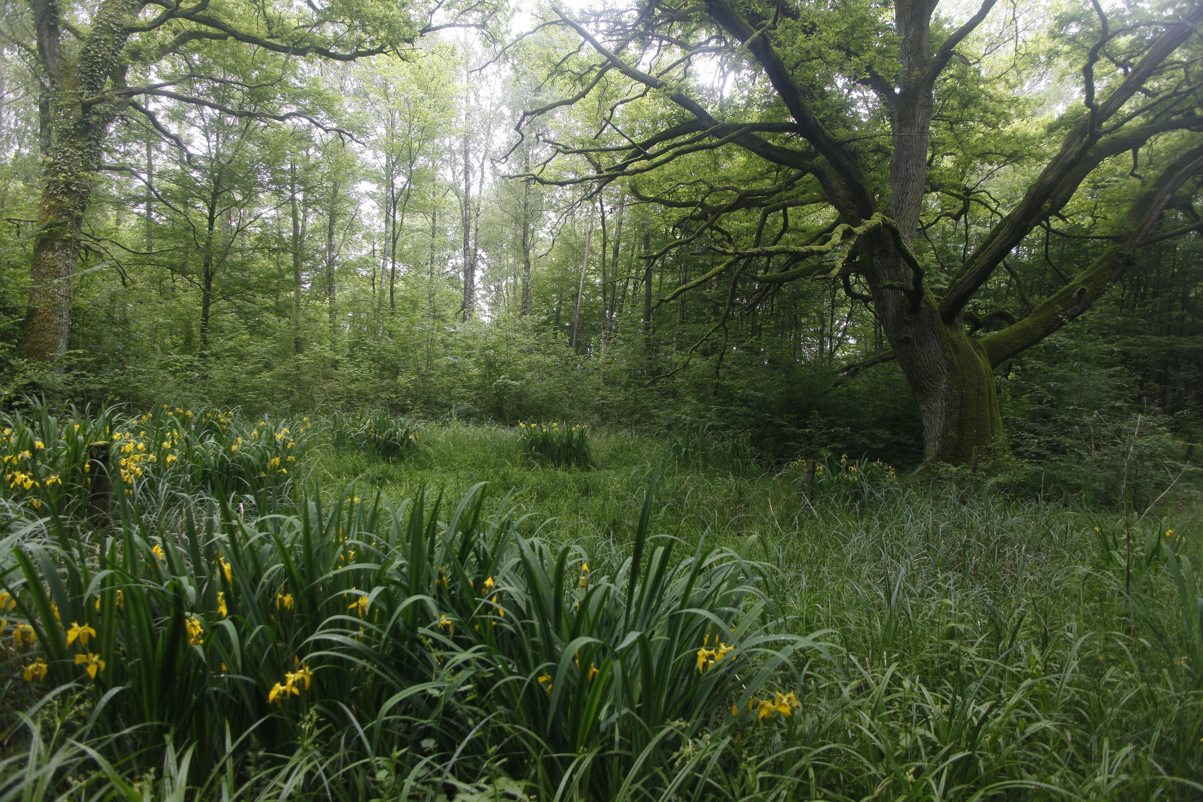 Chênes et iris jaune à Lachaussée